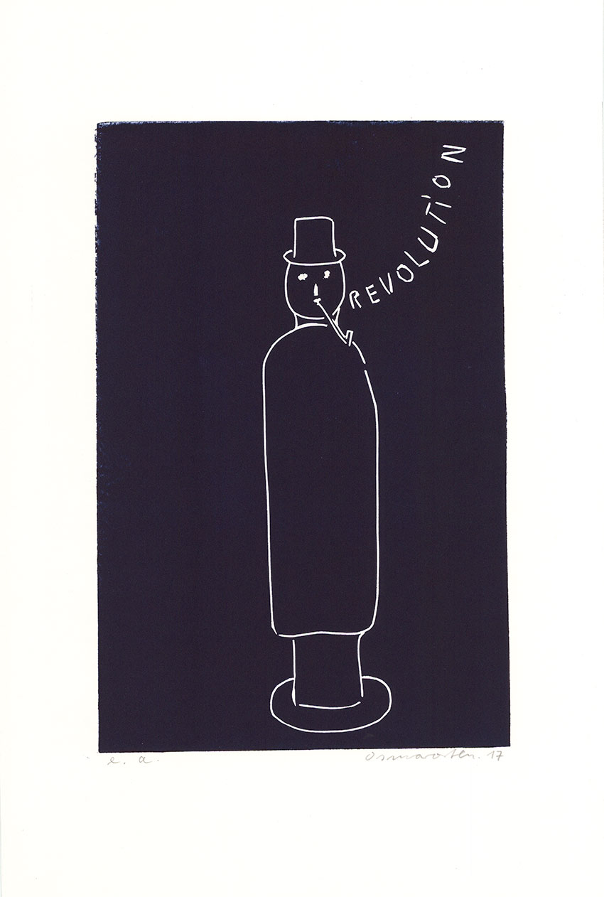 Osmar Osten, Revolution, Druck